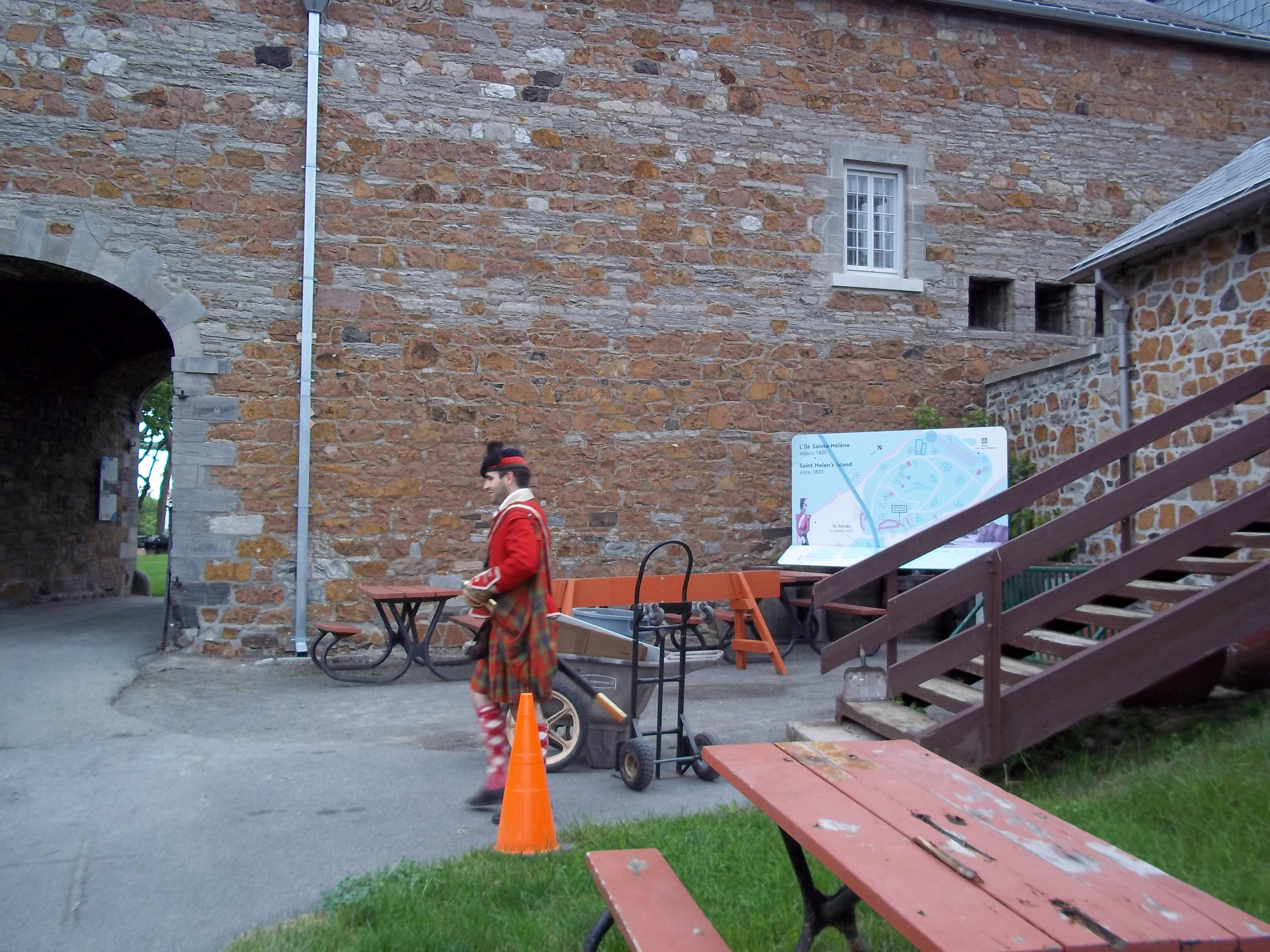 Entrée du musée Stewart de l'île Sainte-Hélène